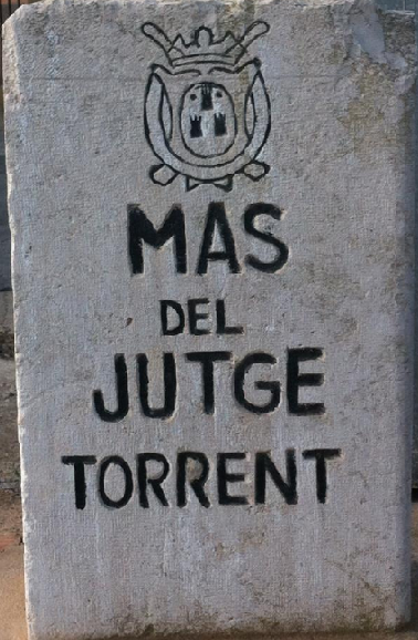 Mas del Jutge